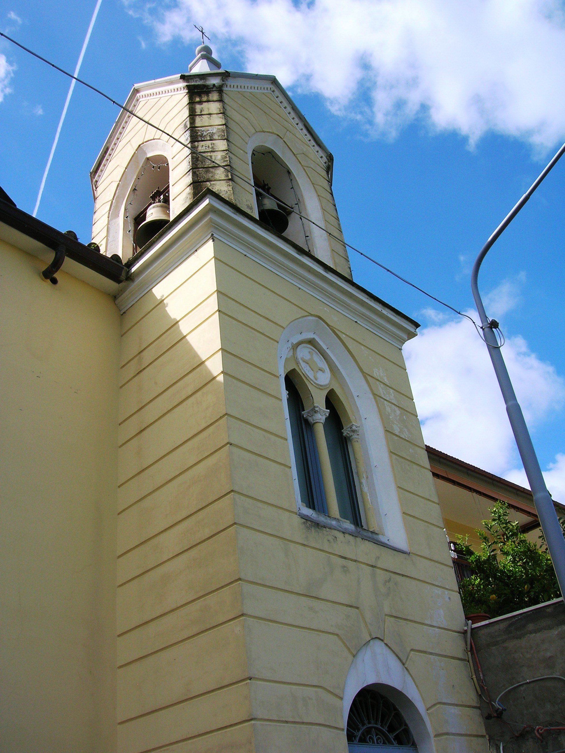 Santuario di Santa Maria della Sanità a Castellammare di Stabia